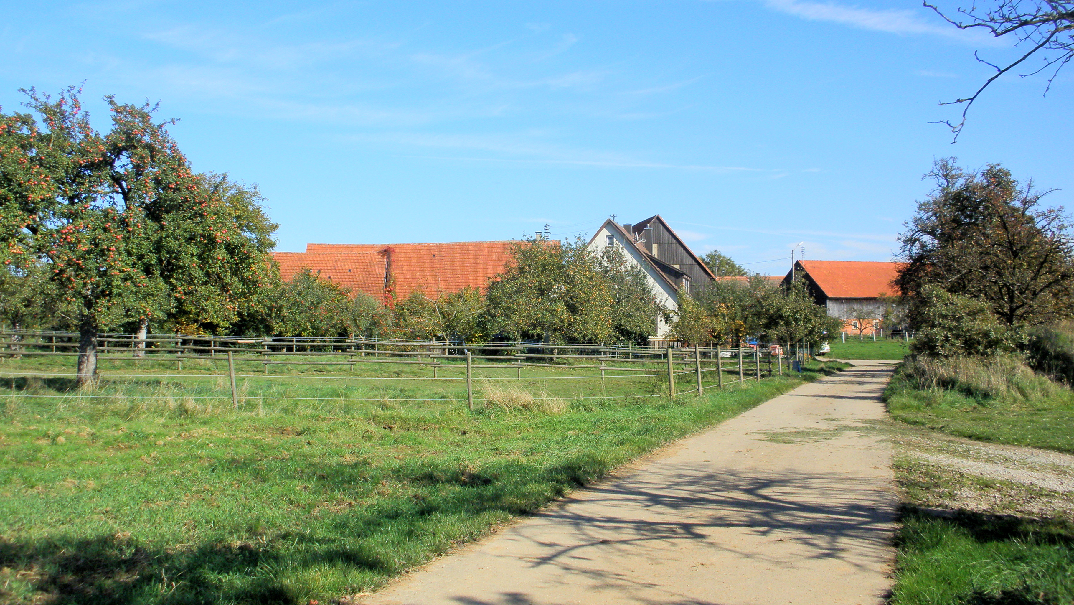 Ruppertshofener Teilort Steinenbach